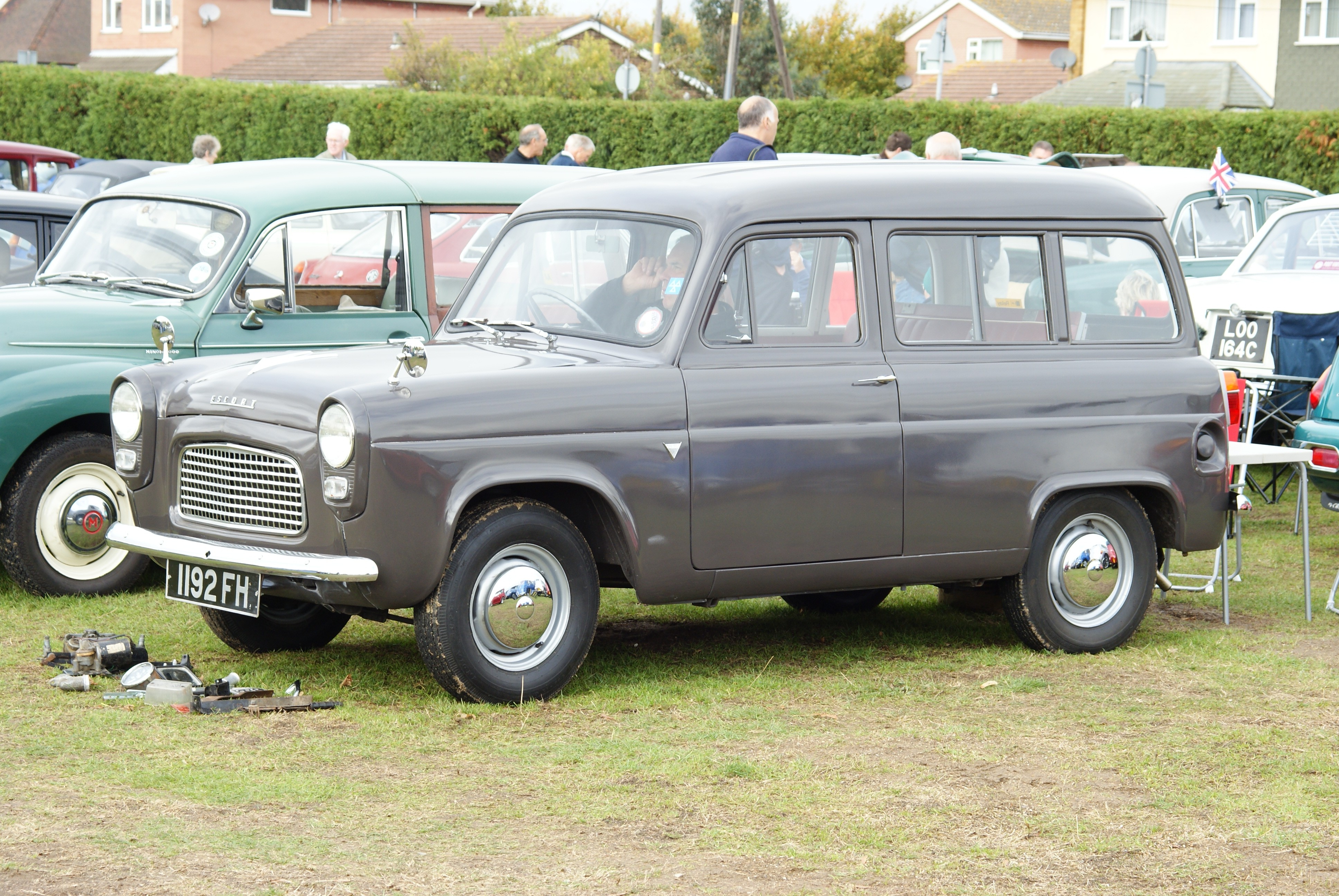 Ford Escort 100E. 1192FH-2 111009 CPS